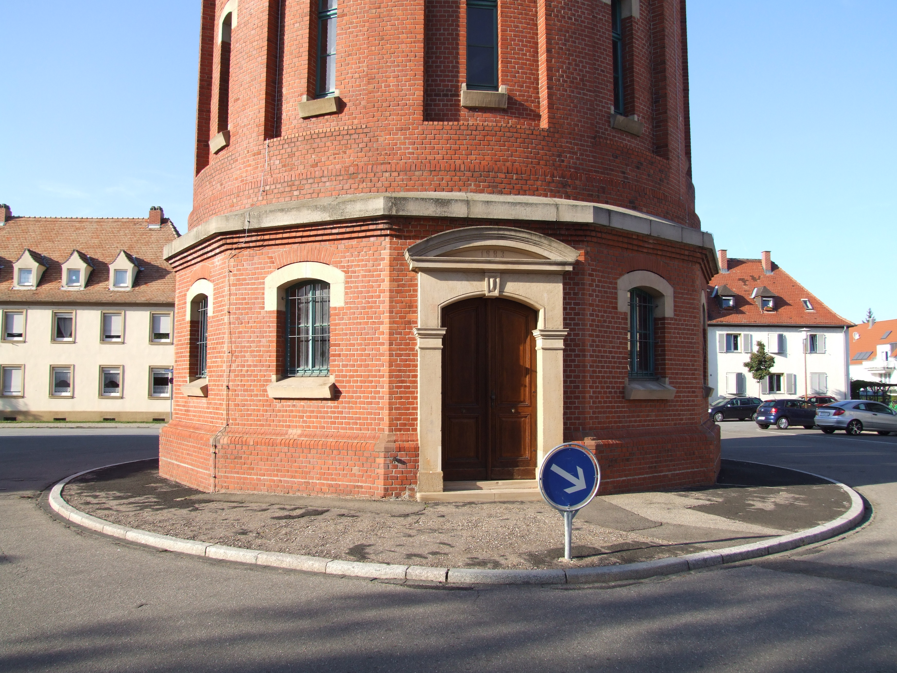 Wasserturm Speyer, Eingang, Speyer-West auf der Hochterasse ist geographisch der höchste Punkt in Speyer